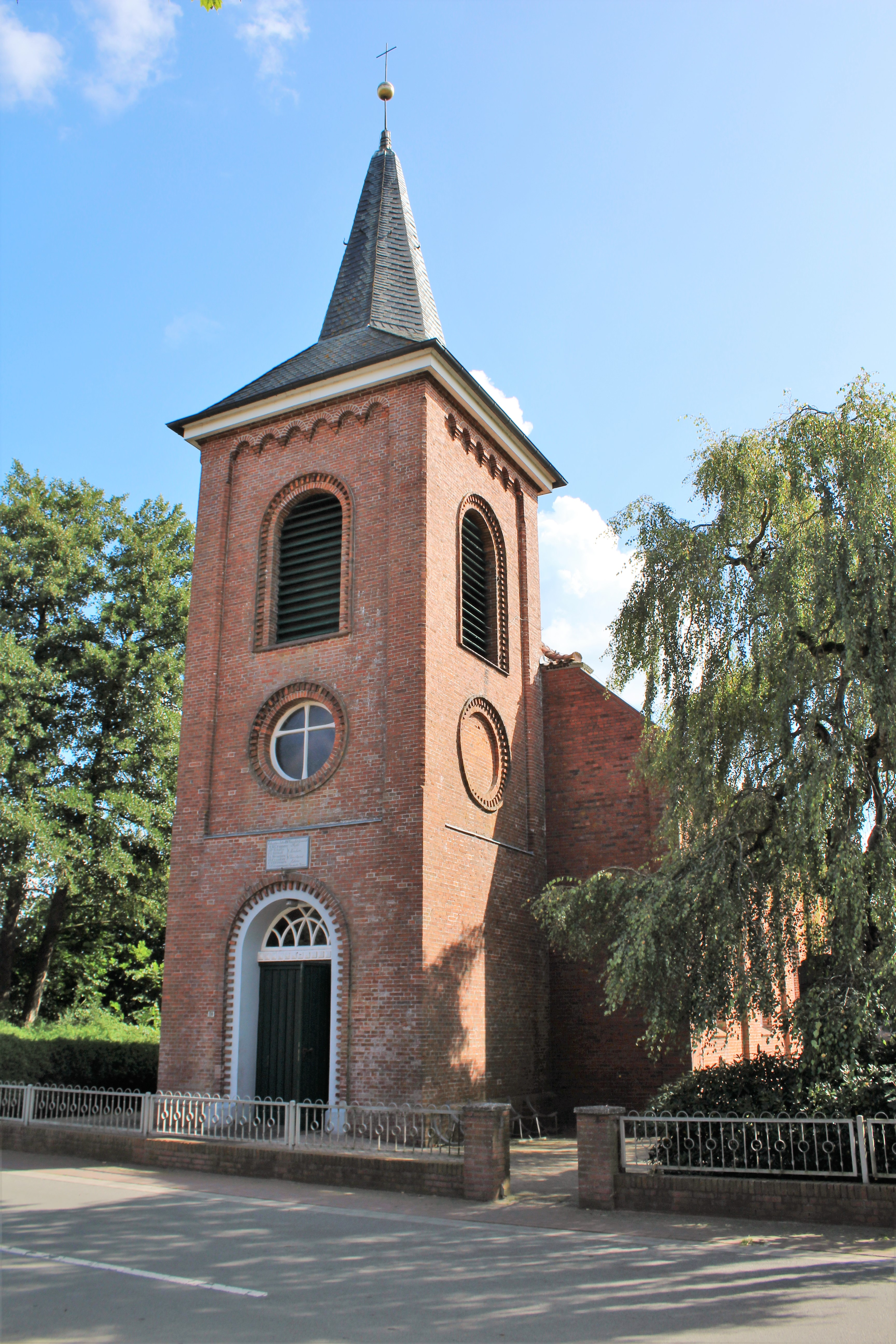 Ev.-reformierte Kirche Weenermoor, Landkreis Leer, Ostfriesland, Deutschland